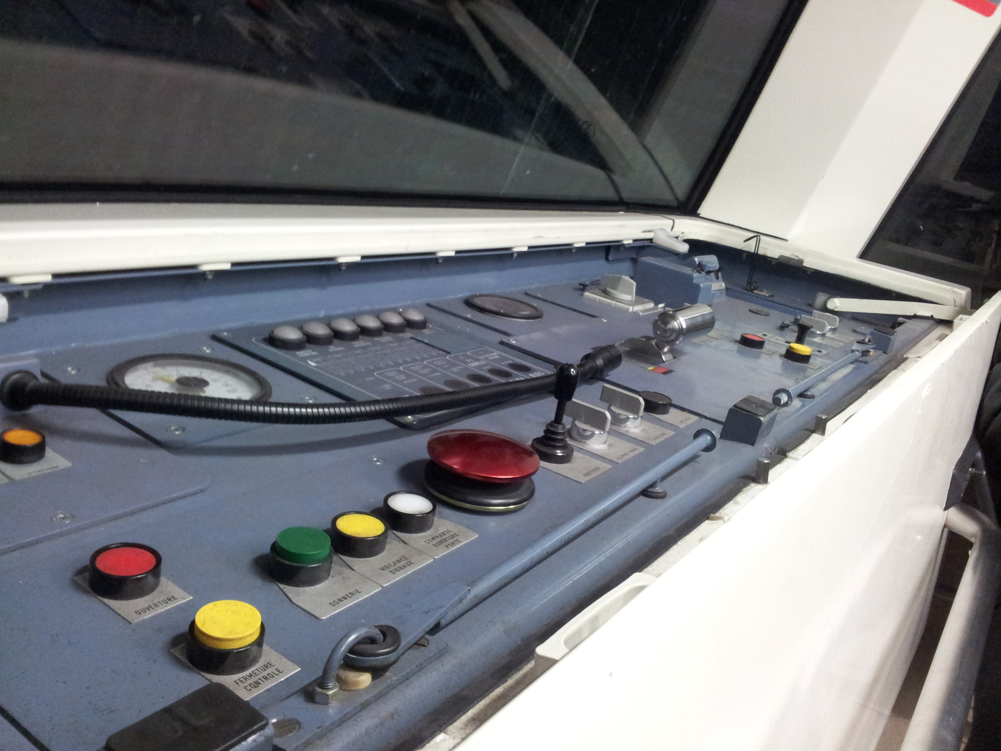 Tableau de bord d'une rame MP 05